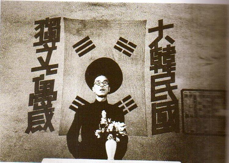 1943년 3월, 중국 충칭에서 열린 자유한인대회에서 대한민국임시정부 임시의정원이자 한국의 독립운동가 홍진 의장 모습.